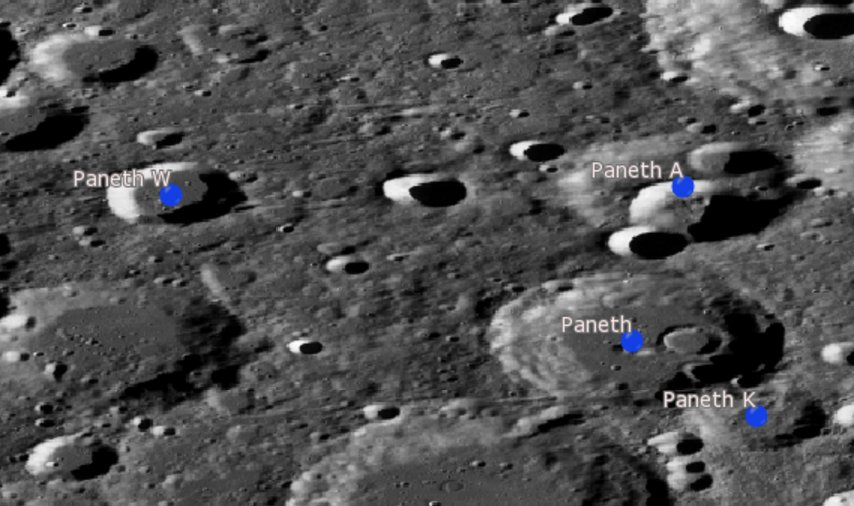 Cráter lunar Paneth. Cráteres satélite. (Imagen LRO)